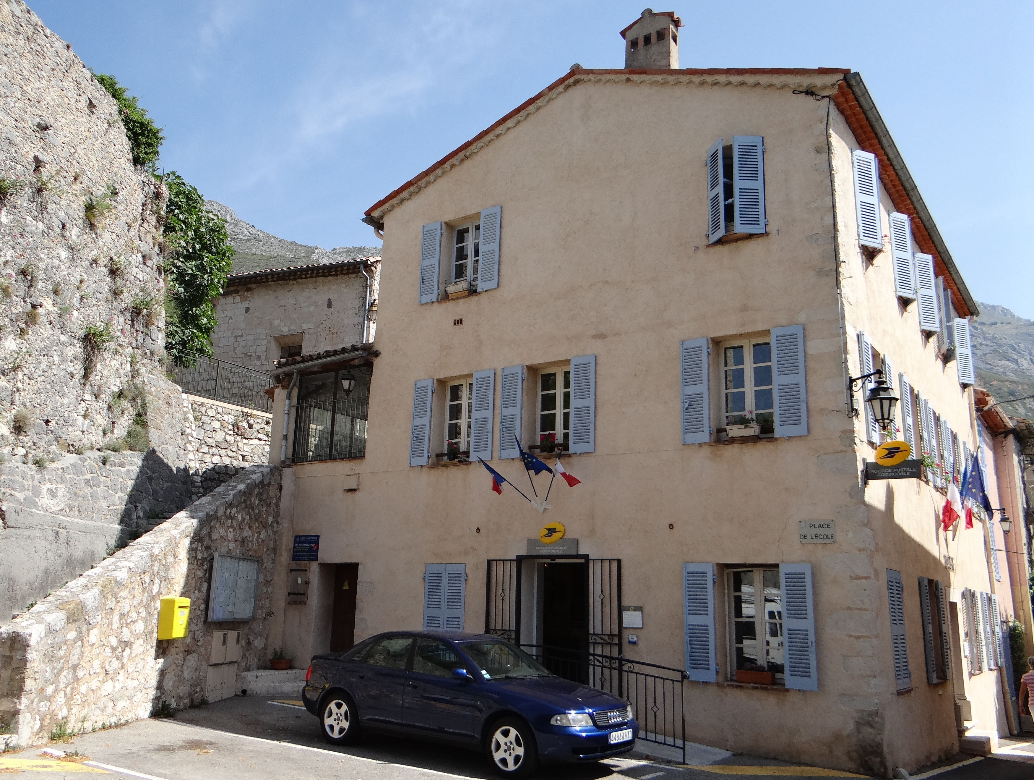 Gréolières - Mairie et agence postale